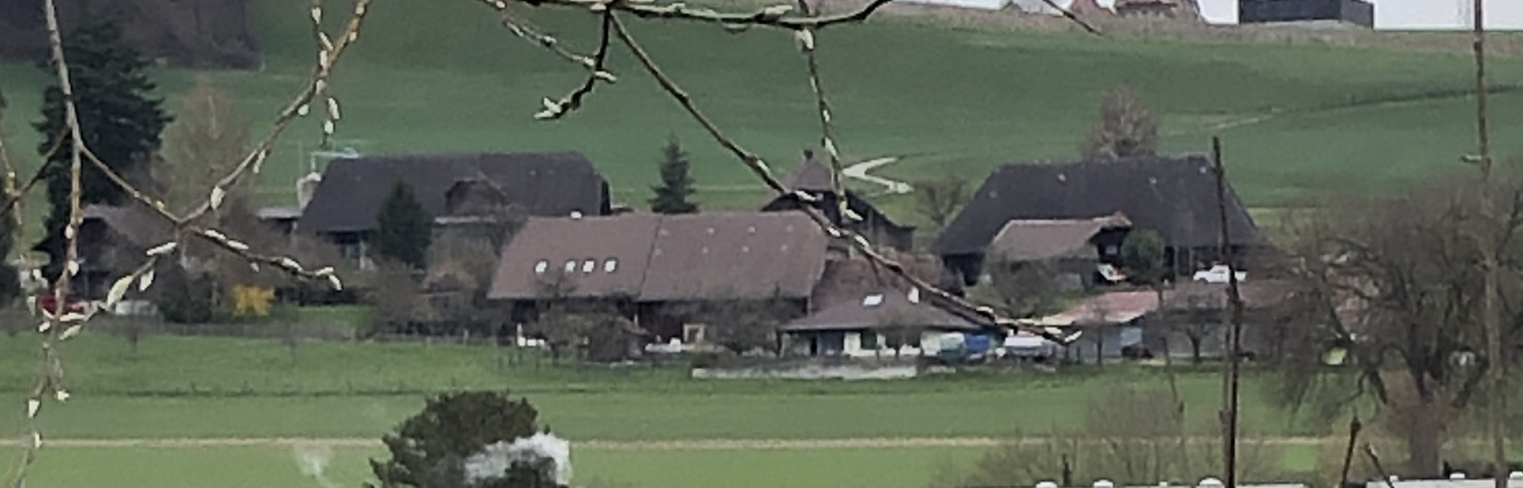 Riedern Weiler